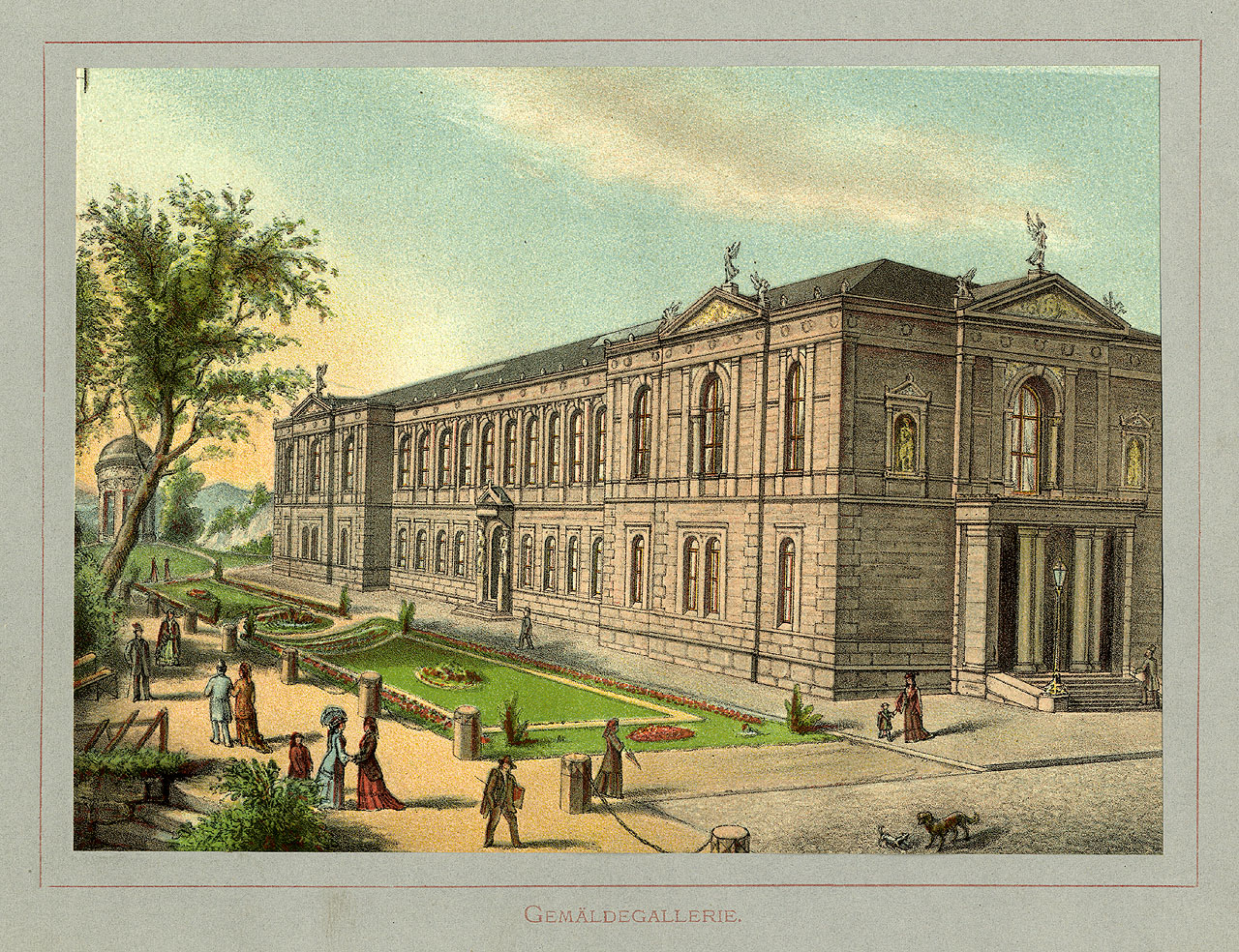 Ansicht der Gemäldegalerie in Kassel (zwischen 1877-1892)